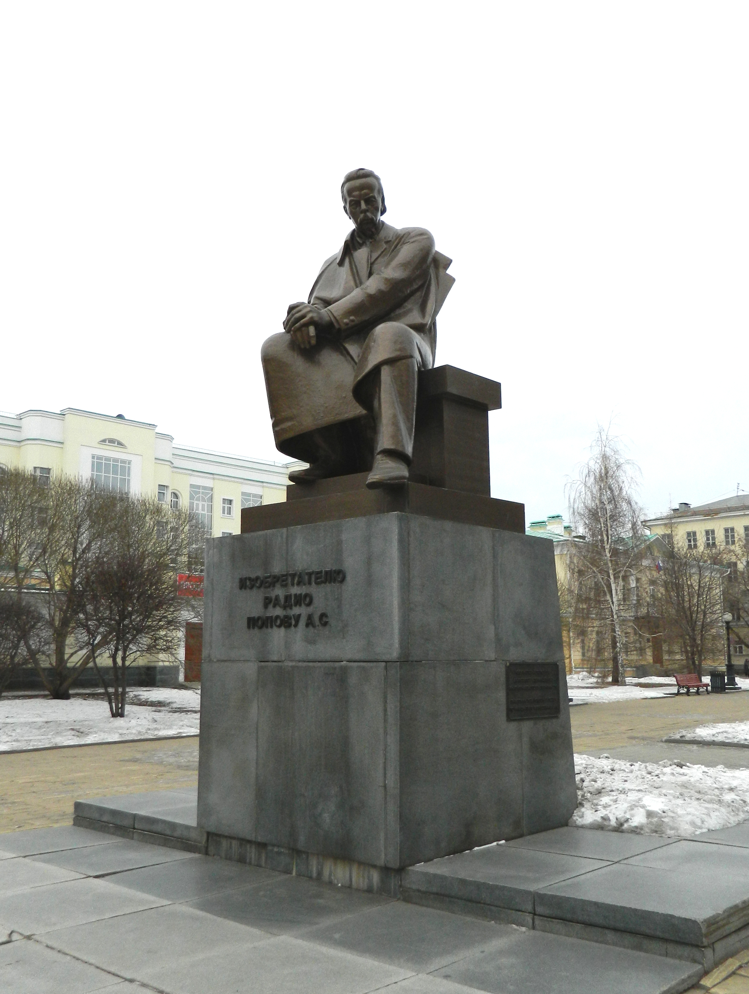 Памятник изобретателю радио Попову А.С. Monument to the inventor of the radio Popov A.S.